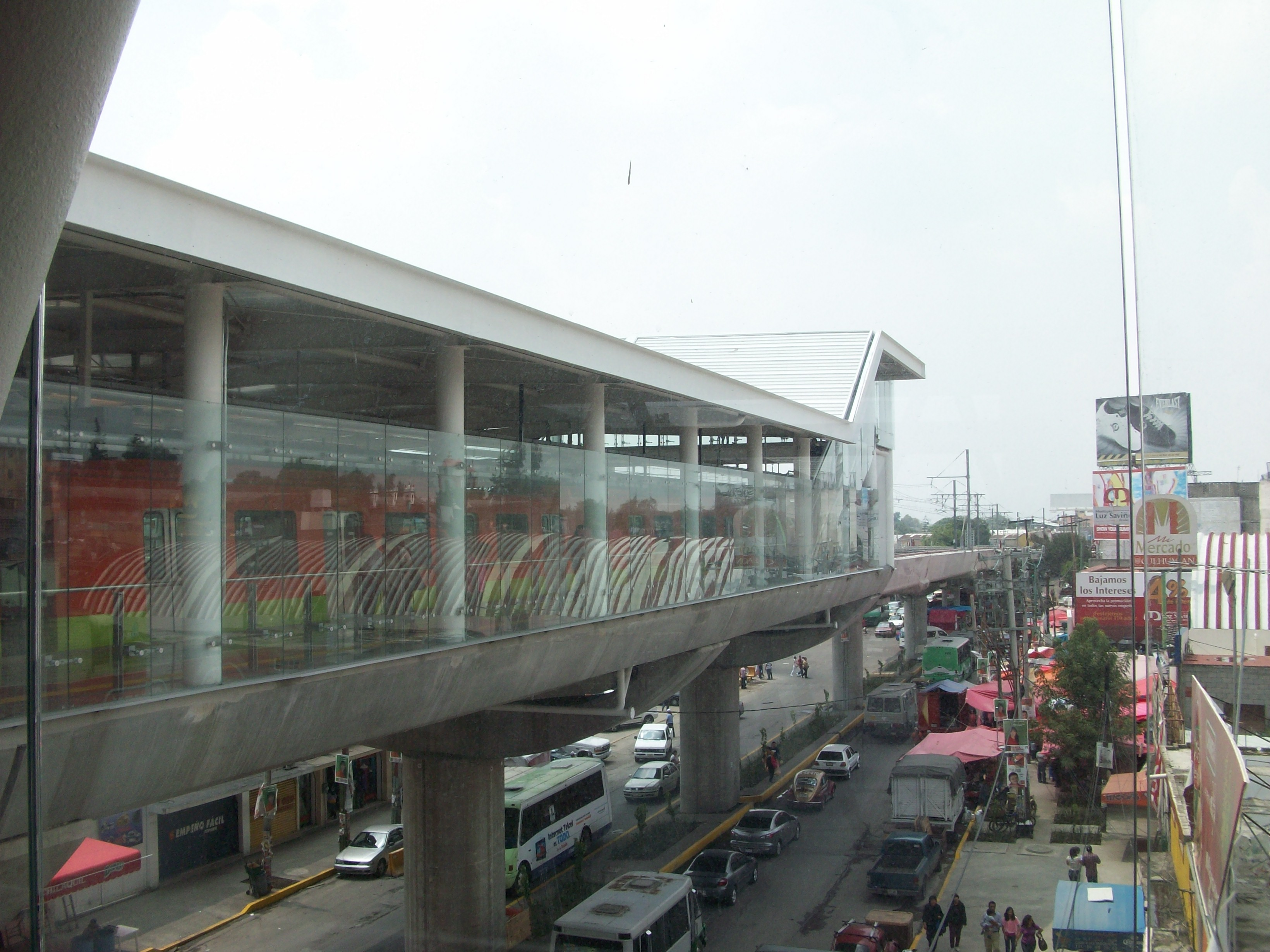 edificio de andenes